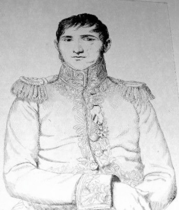 Général baron Jean-Baptiste Jeanin